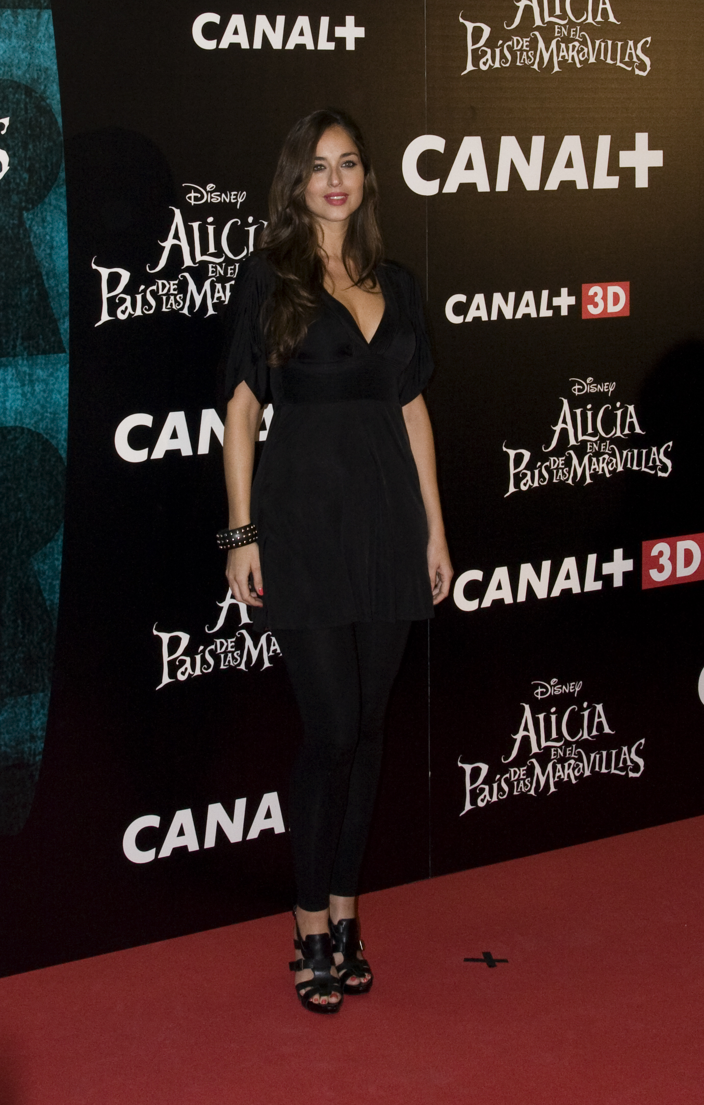 Lorena Van Heerde en el photocall de Alicia en el país de las Maravillas en 2010.